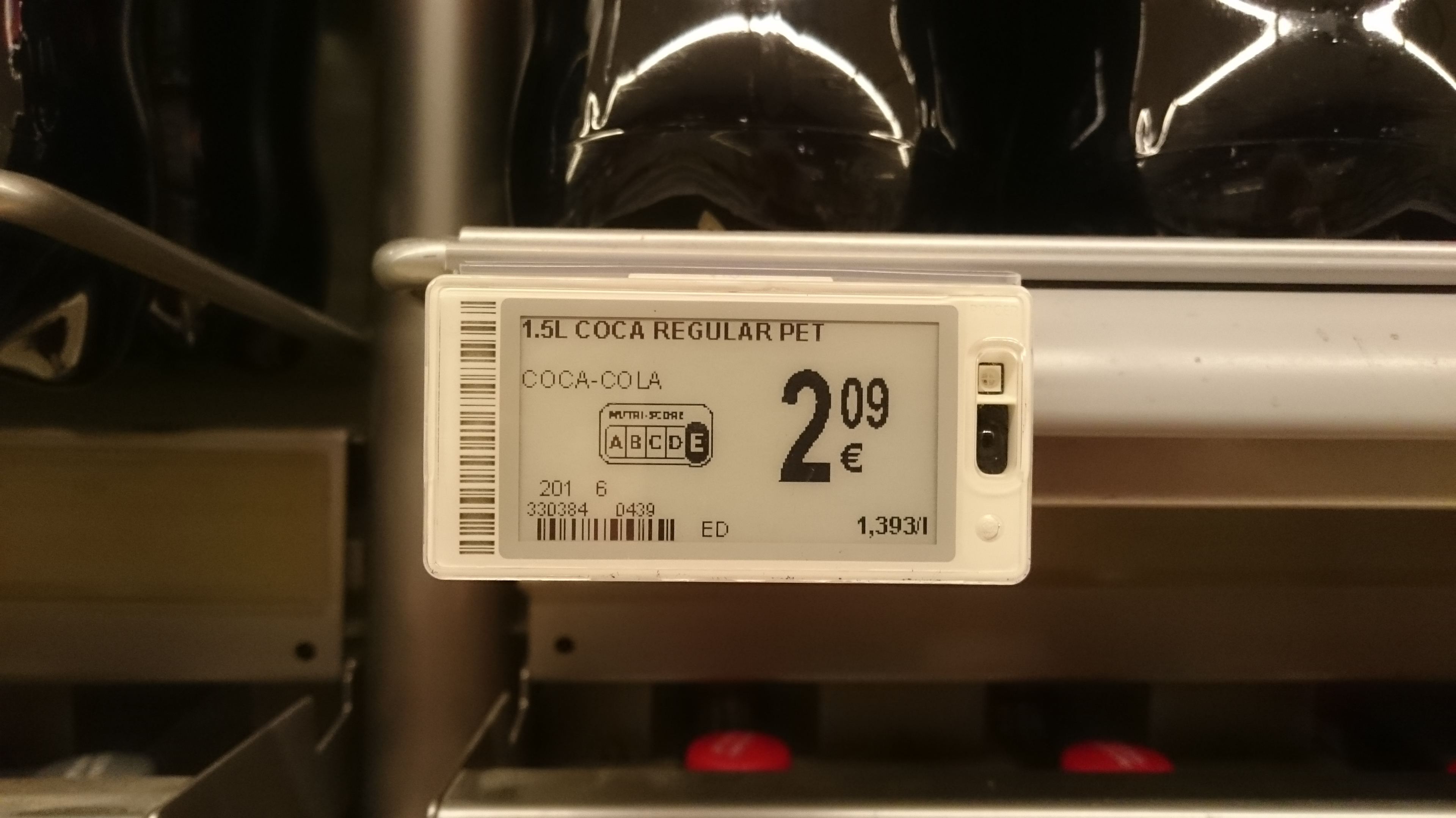 Coca Cola regular : prix et Nutri-Score